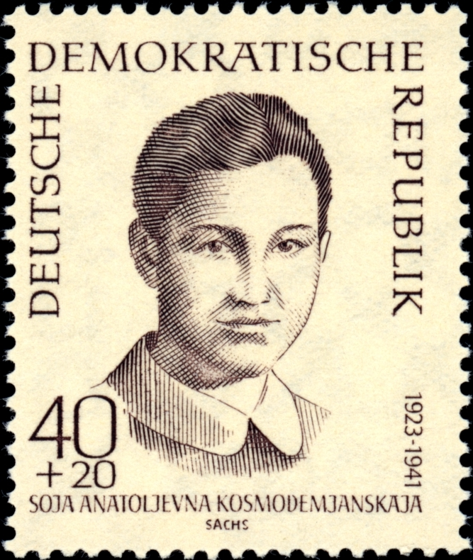 Information: Ausgabepreis: Pfennig First Day of Issue / Erstausgabetag: Auflage: Entwurf: Druckverfahren: Michel-Katalog-Nr: Ländercode-MiNr